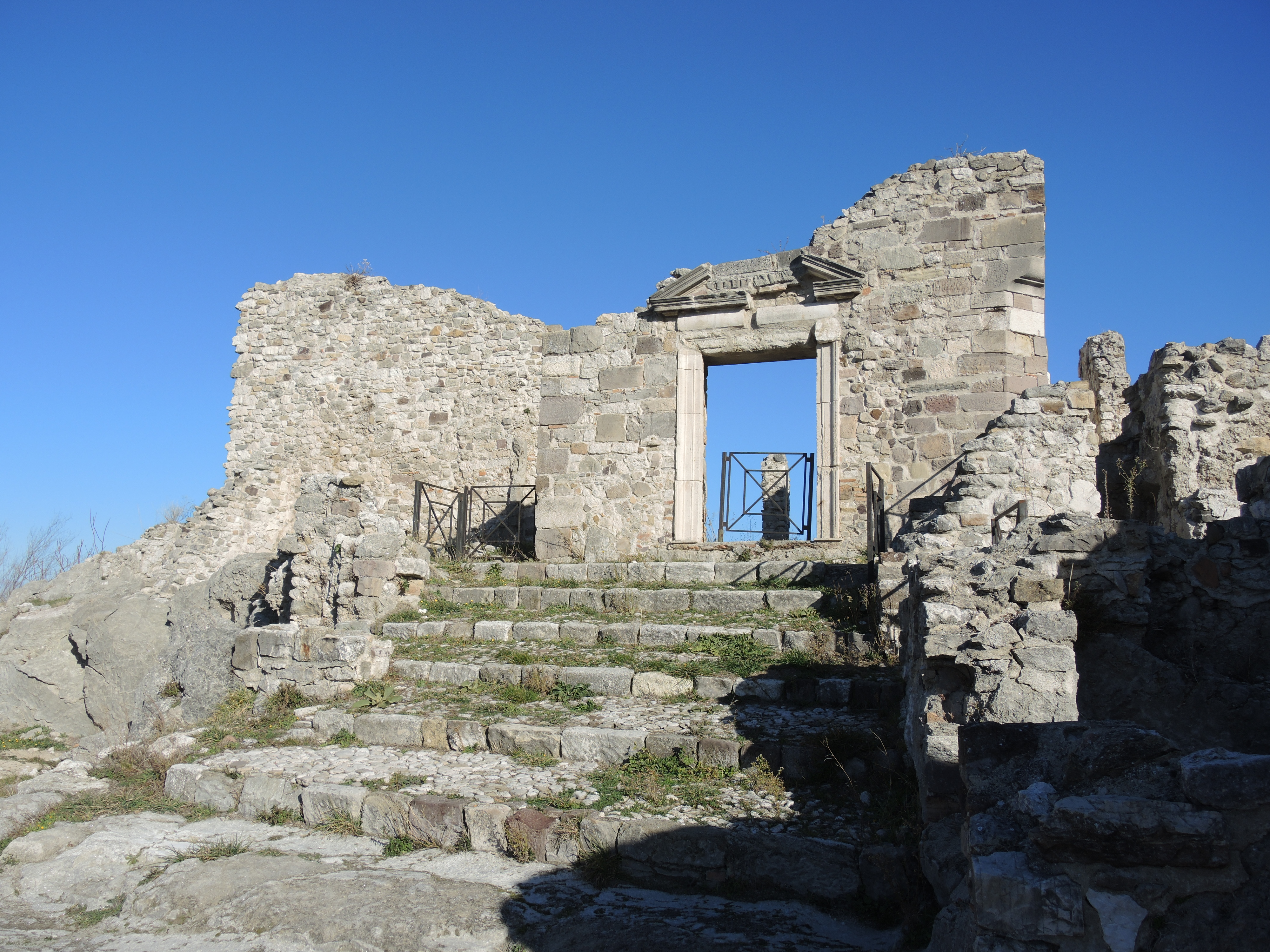 Gessopalena: Chiesa di Sant'Egidio